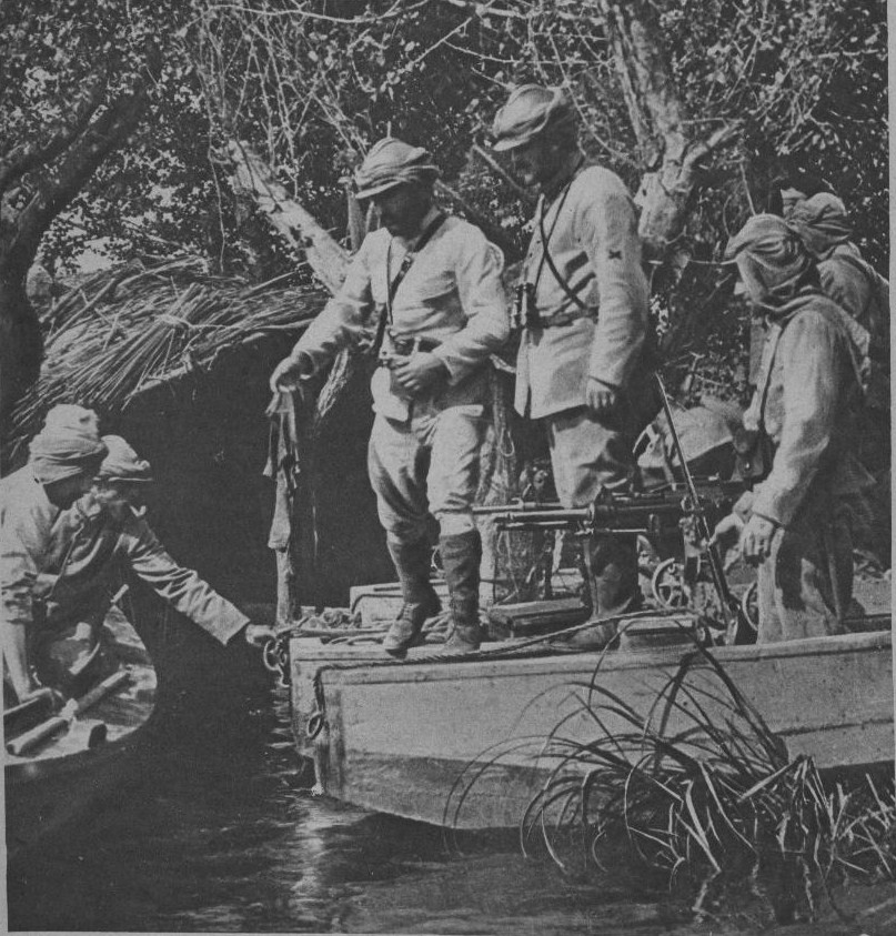 Patrouille sur le Vardar des troupes françaises.